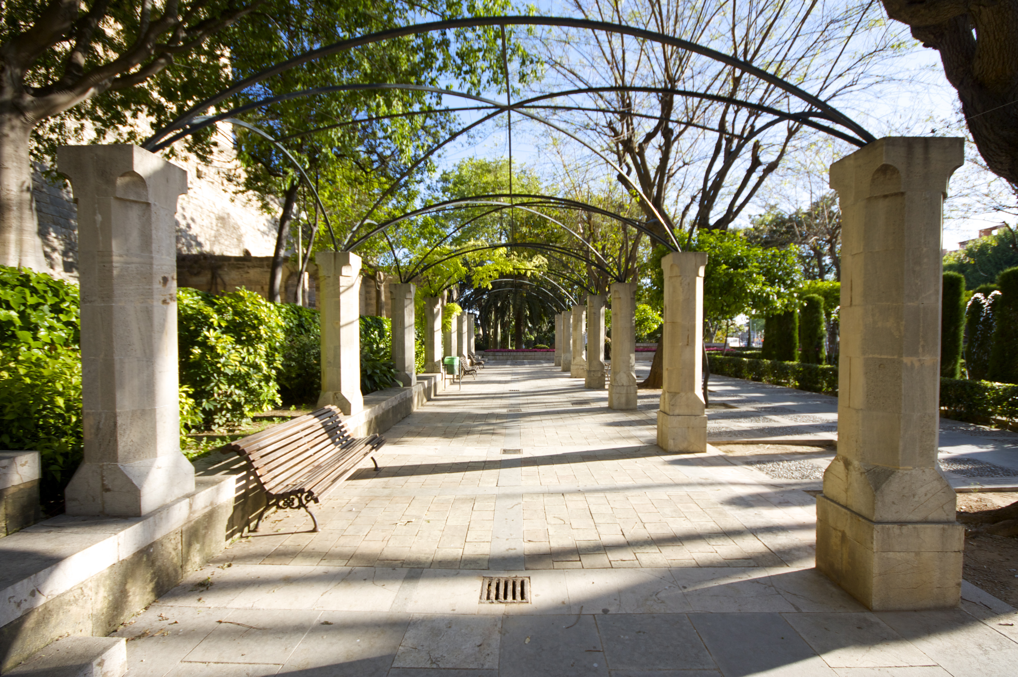 Jardines del Rey